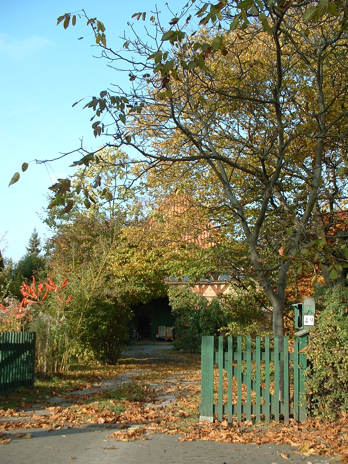 ältestes noch erhaltenes Haus in Vöhrum